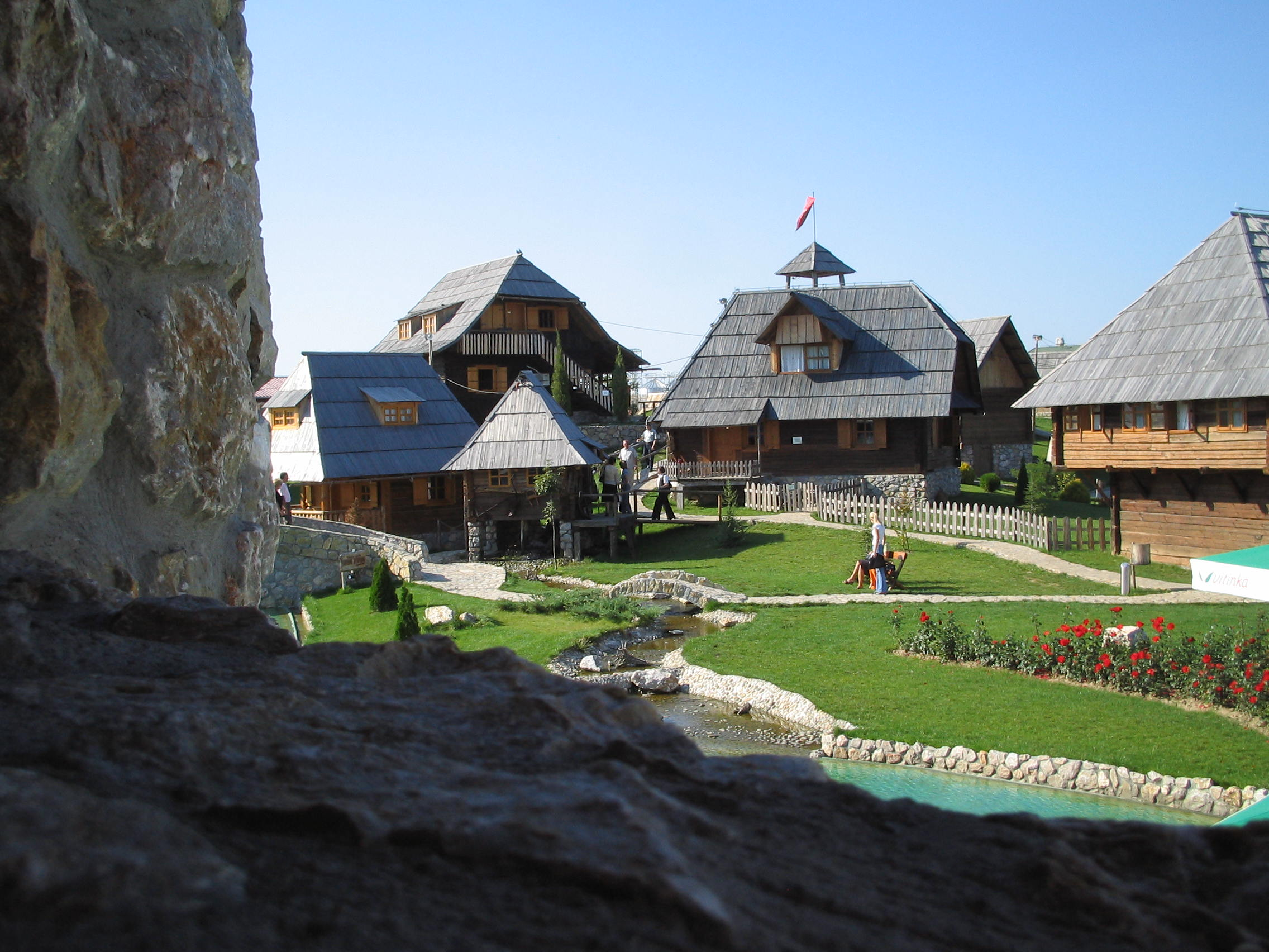 Етно село „Станишићи“